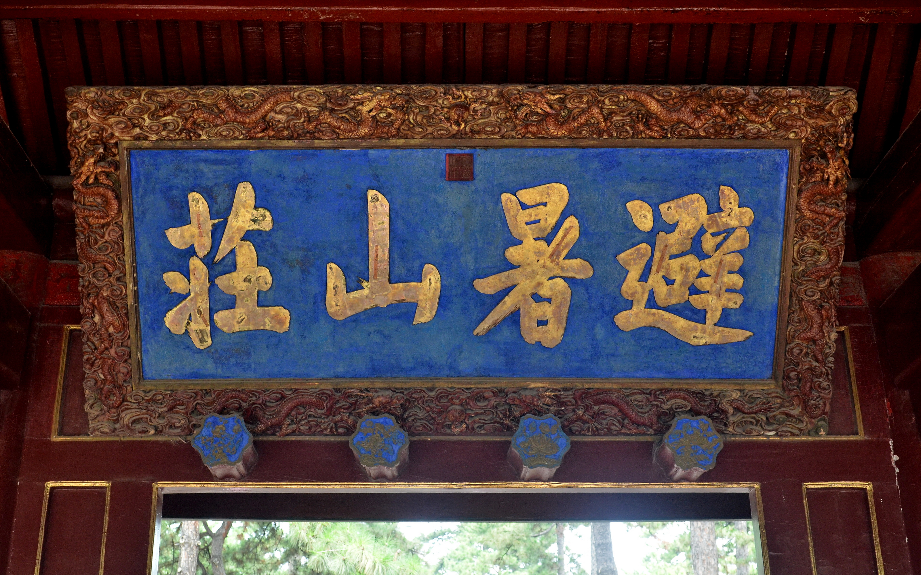 山庄内午门上康熙帝御笔避暑山庄匾额,匾额上的"避"字“辛”字旁多一横